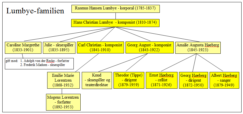 H.C. Lumbyes kunstneriske efterkommere Children and grandchildren of H.C. Lumbye